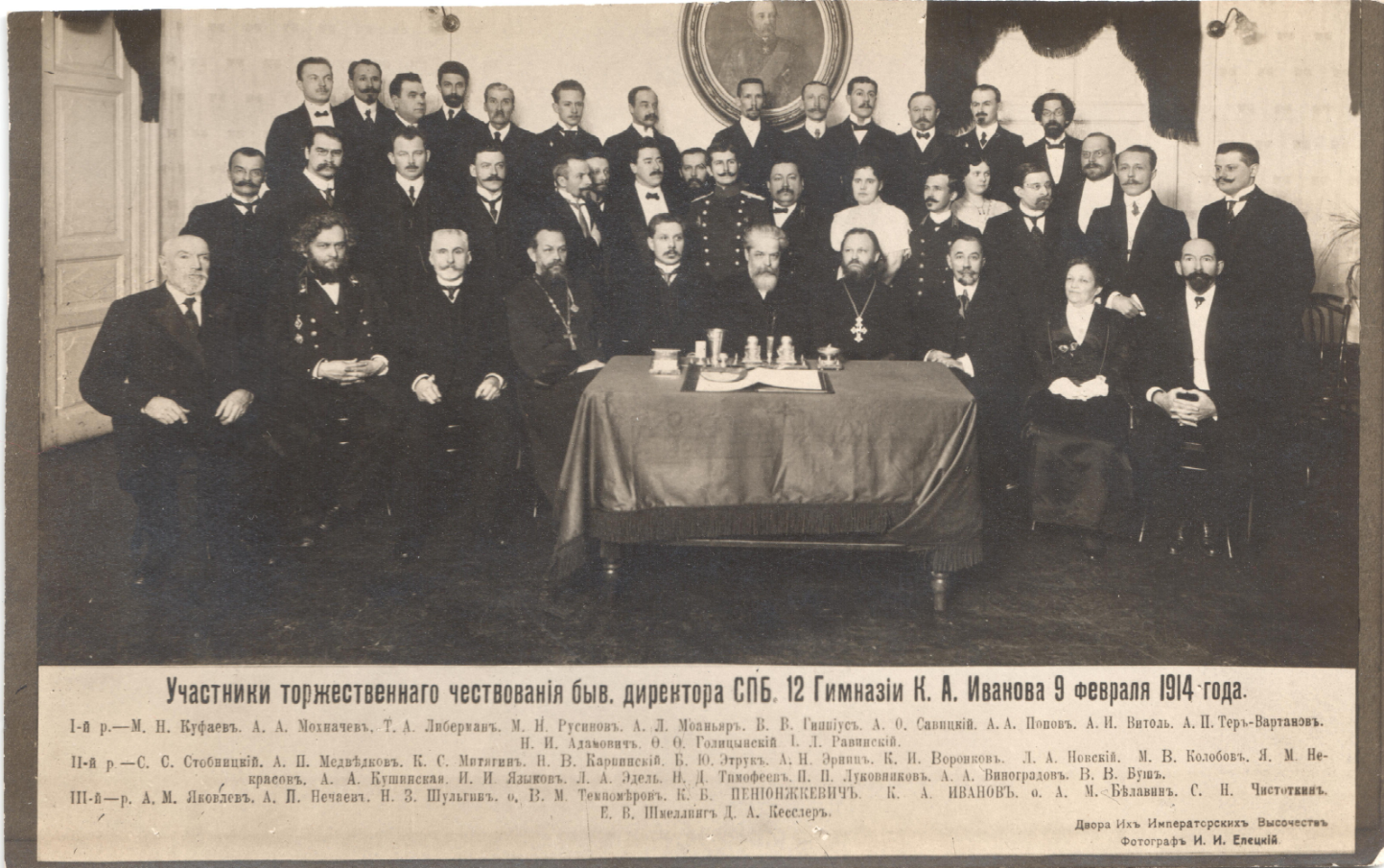 Для статьи